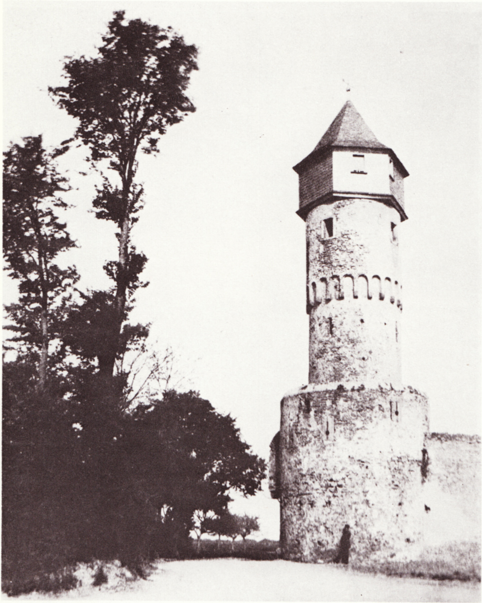 Galluswarte in Frankfurt am Main, 1856Das Bild wurde lt. Quelle vom Fotografen seitenverkehrt abgezogen.